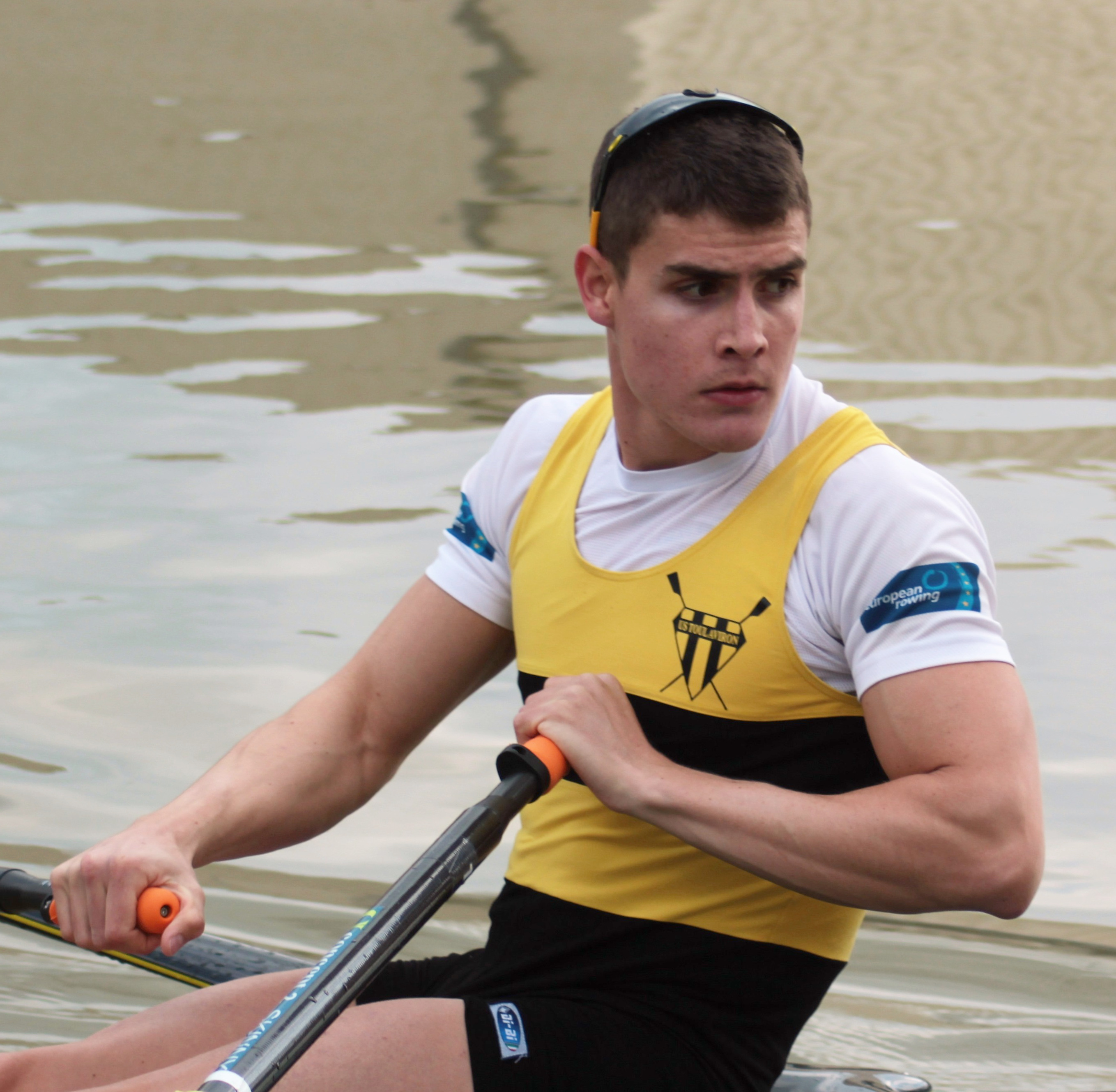 Pierre Houin Championnat de France Cazaubon 2016